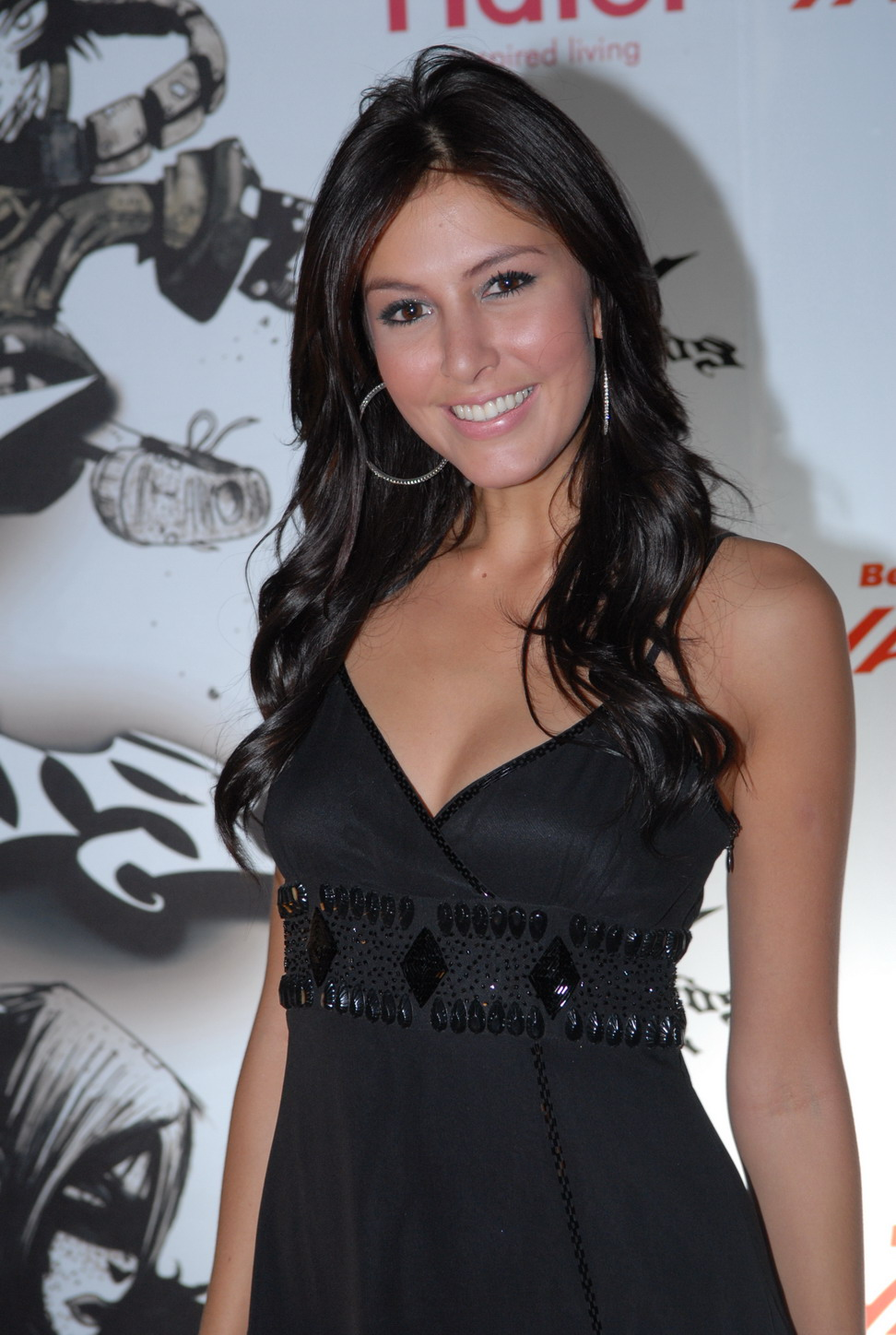 Sririta Janzen at MTV Asia Awards 2006